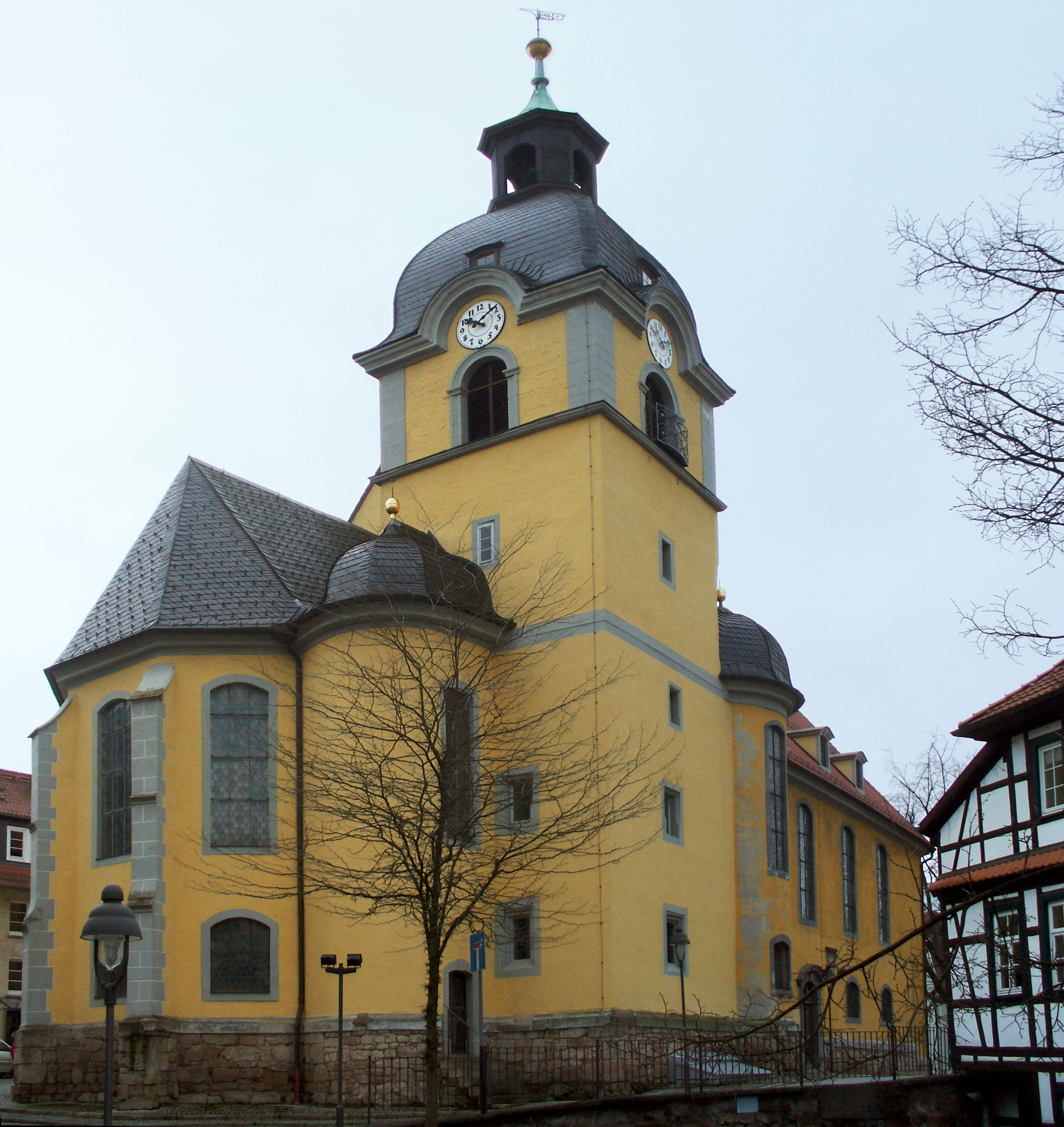 Marienkirche in Suhl